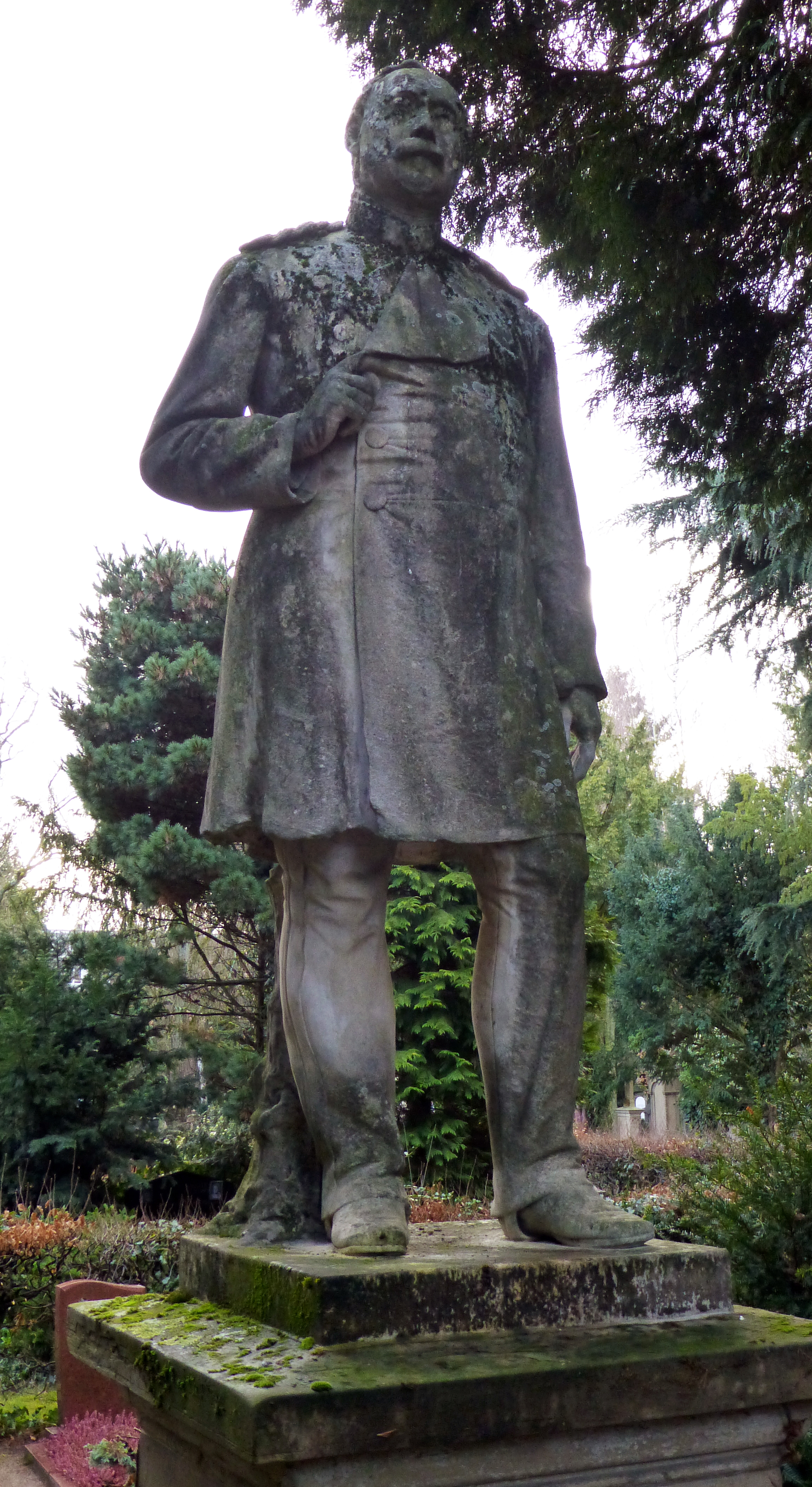 Statue der Grabstätte von Robert von Frankenberg und Ludwigsdorf auf dem Kölner Melaten-Friedhof. Künstler/Bildhauer: Heinrich Hoffmeister 1875.